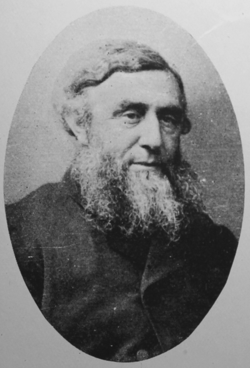 Ds. Frans Lion Cachet